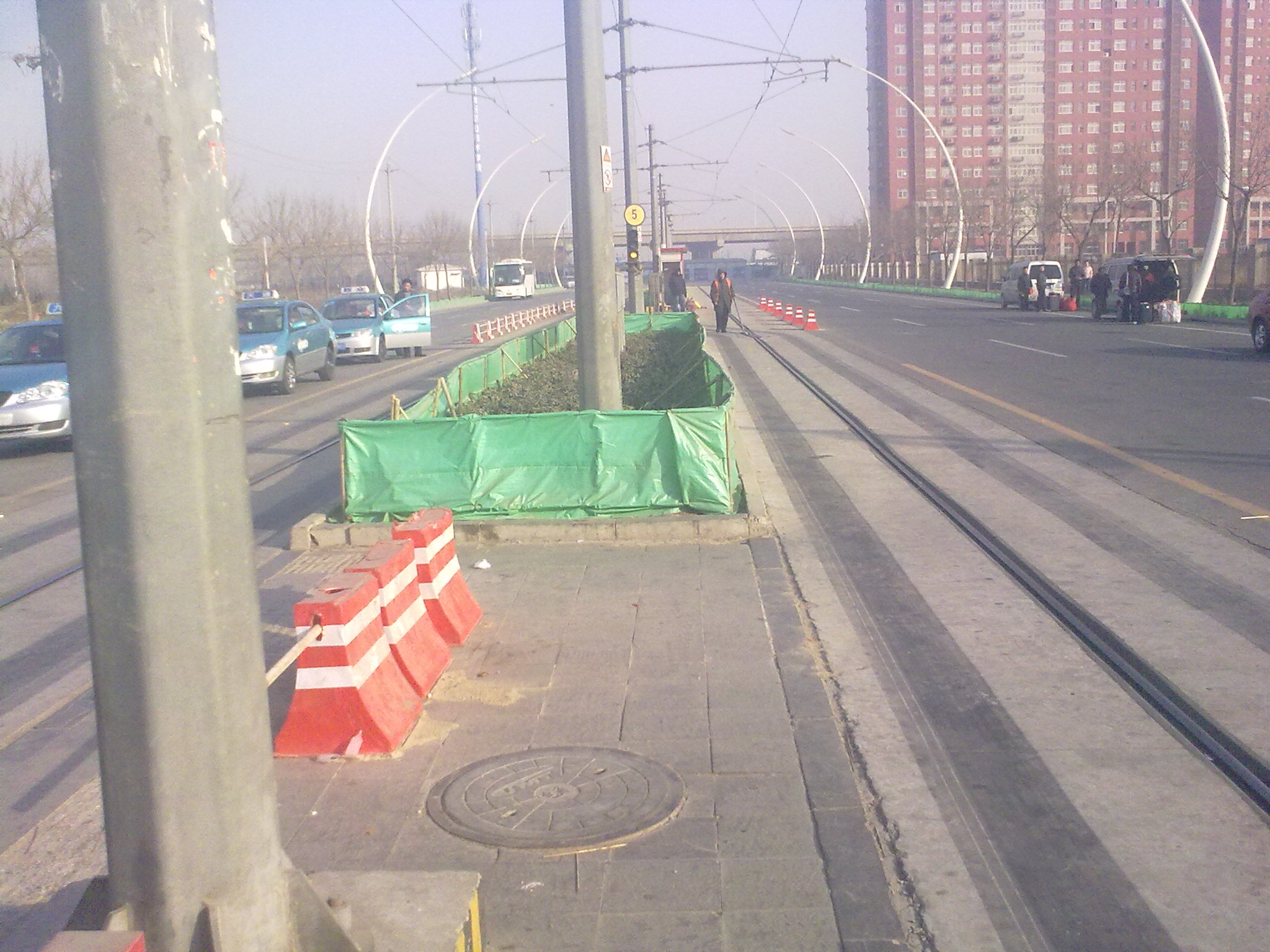 学院区北站北端折返线